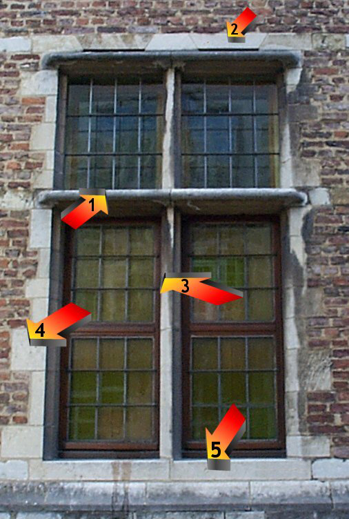 Ufsia-gebouw Prinsstraat Antwerpen. Kruiskozijn met 1) kalf 2) latei 3) penant 4) neggenblok 5) dorpel Fotograaf: Luk Van Loock